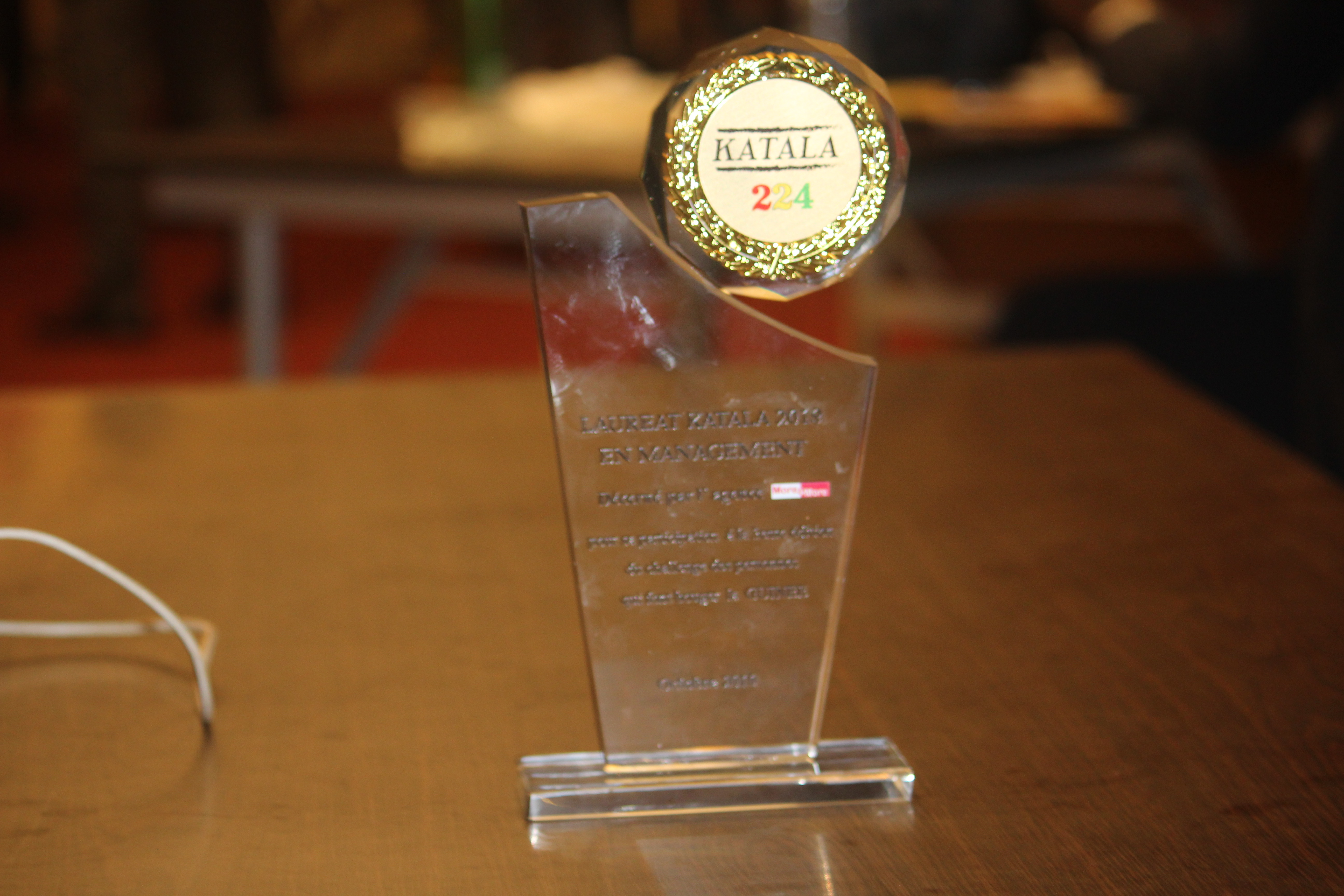 Trophées de la cérémonie katala 224